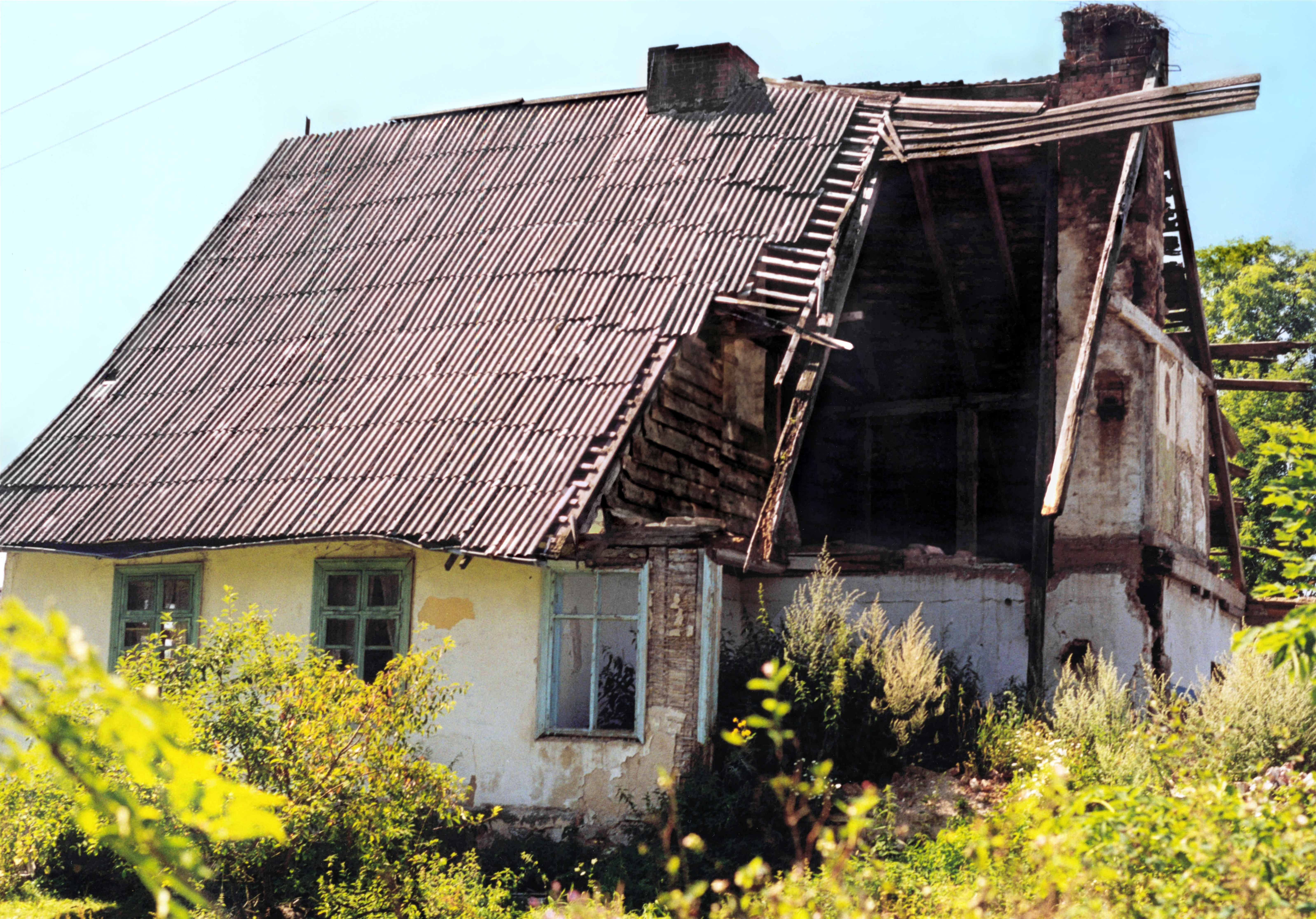 Kleschauen (Kleschowen oder Kleszowen), nördliches ehemaliges Ostpreußen: Halbseitig eingestürztes Wohngebäude.